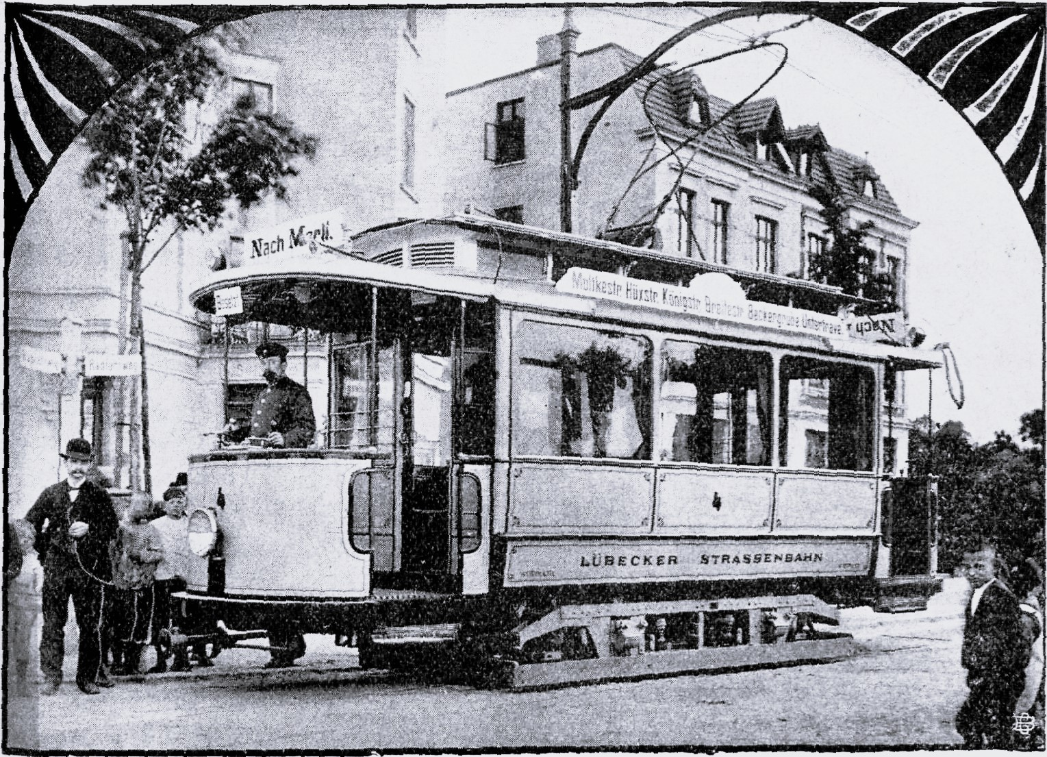 Wagen der Lübecker Straßenbahn Bahnhof-Marli; Anmerkung: Point of view: Van-Höveln-Straße kurz vor der Marlistraße